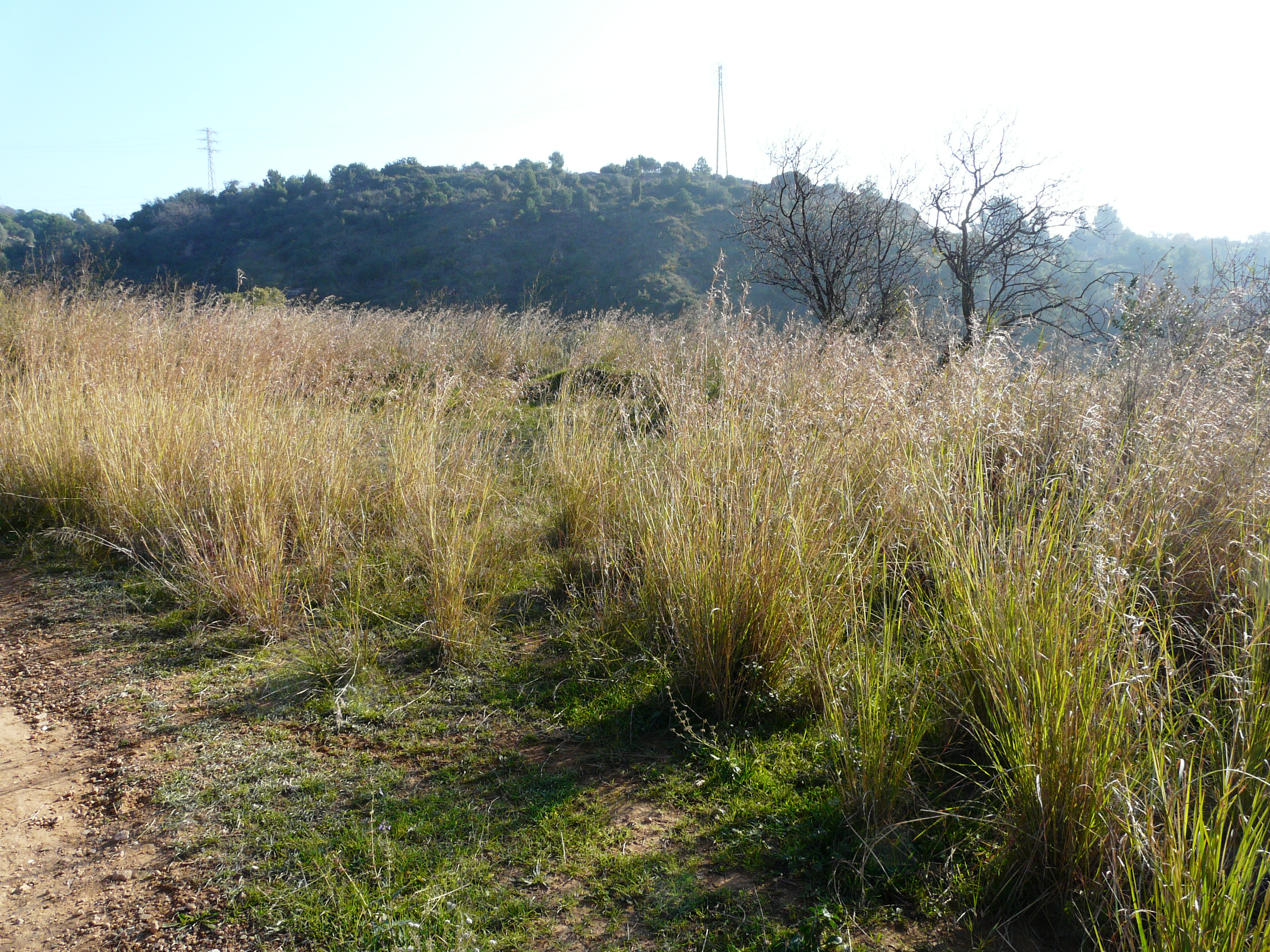 Serra de Collserola (Vallès Occidental, Baix Llobregat, Barcelonès) (Sant Cugat del Vallès, Barcelona, Cerdanyola del Vallès i altres). This is a a photo of a natural area in Catalonia, Spain, with id: ES510066 Object location41° 26′ 24″ N, 2° 06′ 36″ E